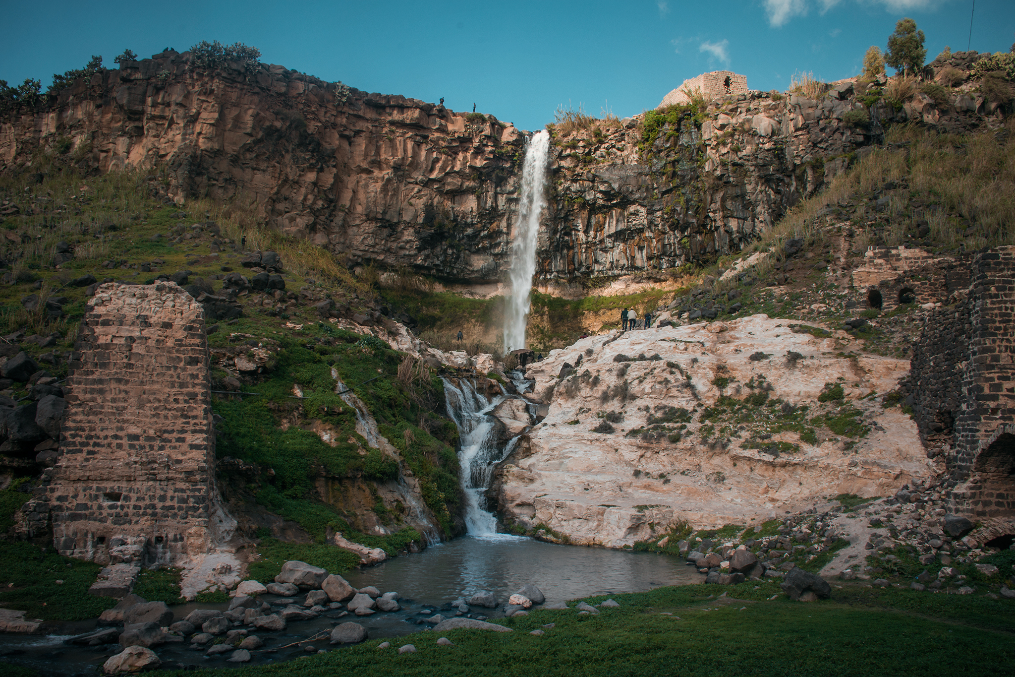 شلالات تل شهاب توجد في قرية تل شهاب التابعة لمحافظة درعا الموجودة في الجمهورية العربية السورية، وتمتاز هذه الشلالات بجمالها البارع، وطبيعتها الرائعة.تقع شلالات تل شهاب على بعد 17 كم شمال غرب مدينة درعا على الحدود الأردنية وعليها يوجد طواحين مائية تعود الى الحقبة رومانية